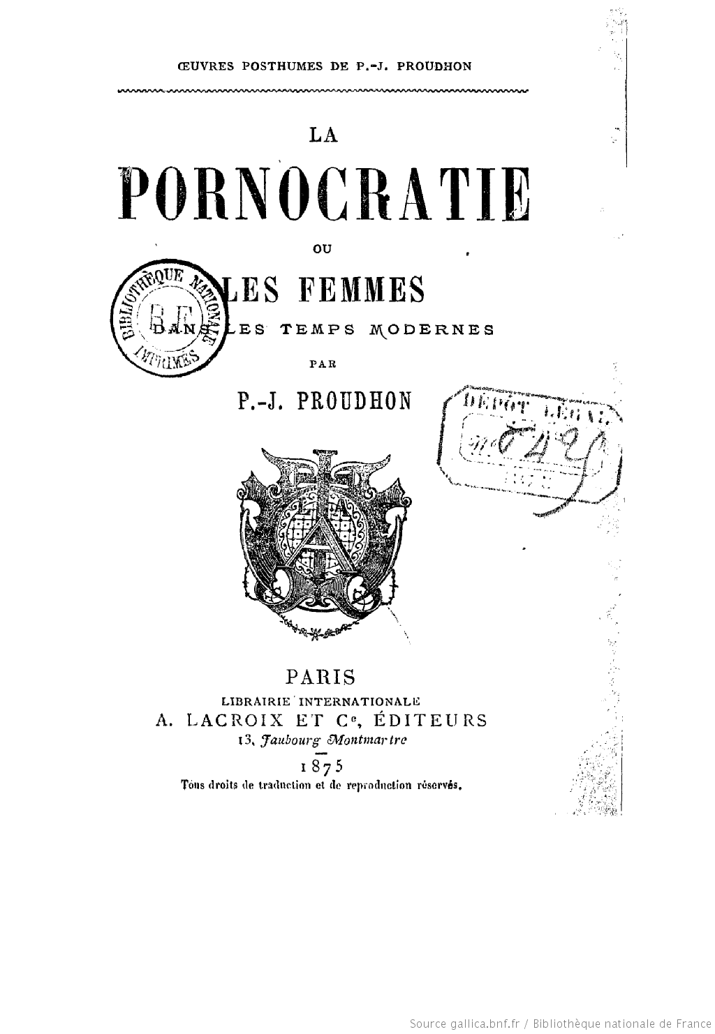 Pierre-Joseph Proudhon - La Pornocratie ou Les Femmes dans les temps modernes, Paris, Librairie internationale, 1875.